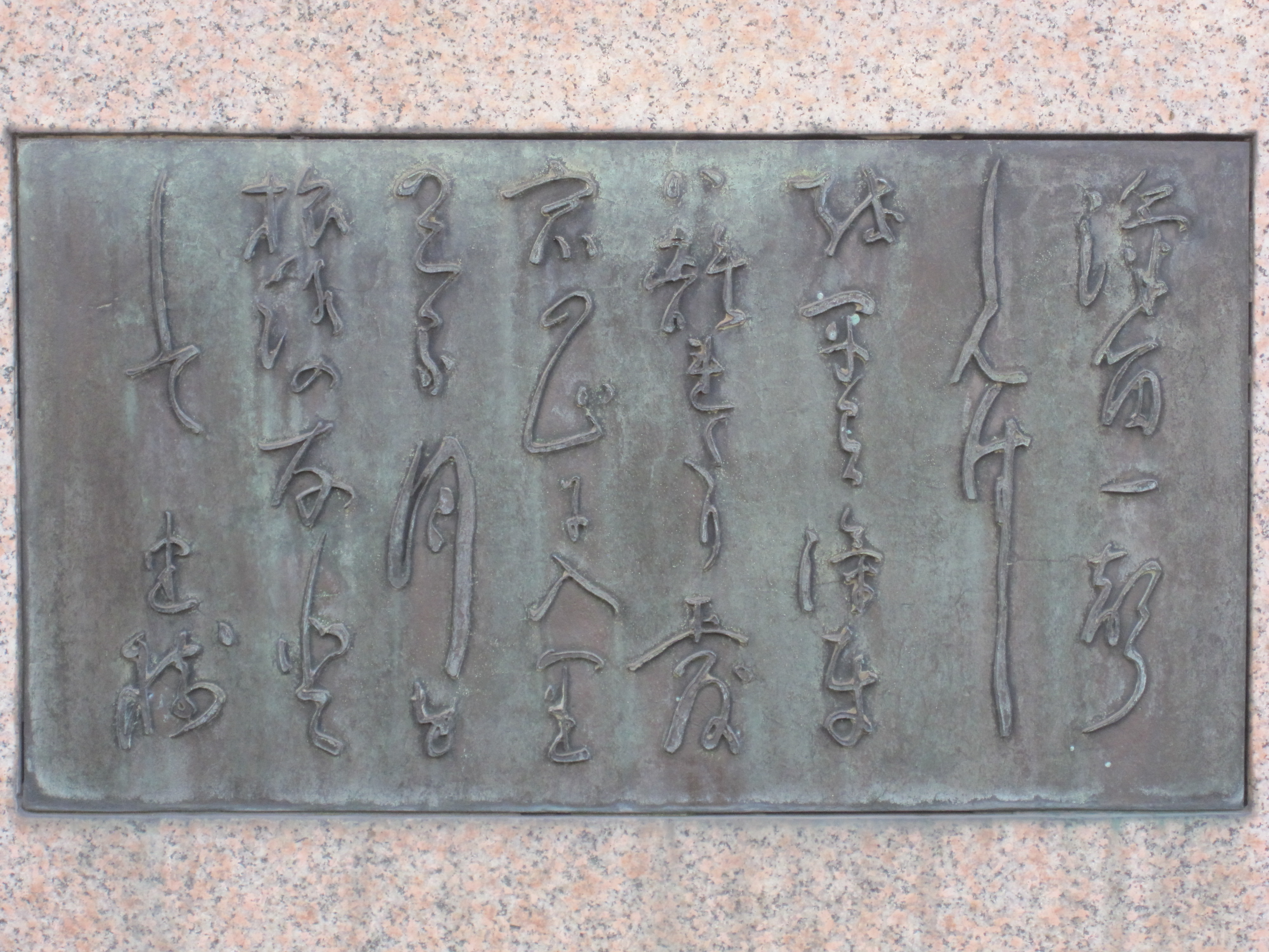 新橋駅汐留口前に設置されている『鉄道唱歌の碑』にはめ込まれた大和田建樹直筆『鉄道唱歌』第1番の歌詞銘板。